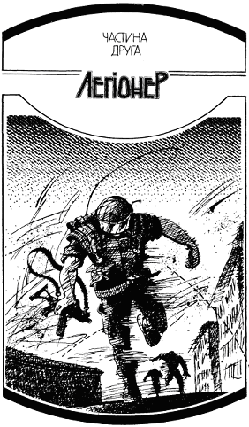 Ілюстрація до 2-ї частини книги братів Стругацьких "Населений острів".